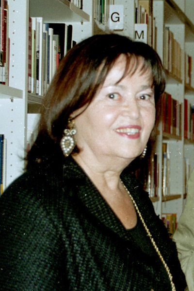 Asta Scheib, deutsche Schriftstellerin, Drehbuchautorin und Redakteurin Hier nach einer Lesung im Münchner Literaturhaus, 2004